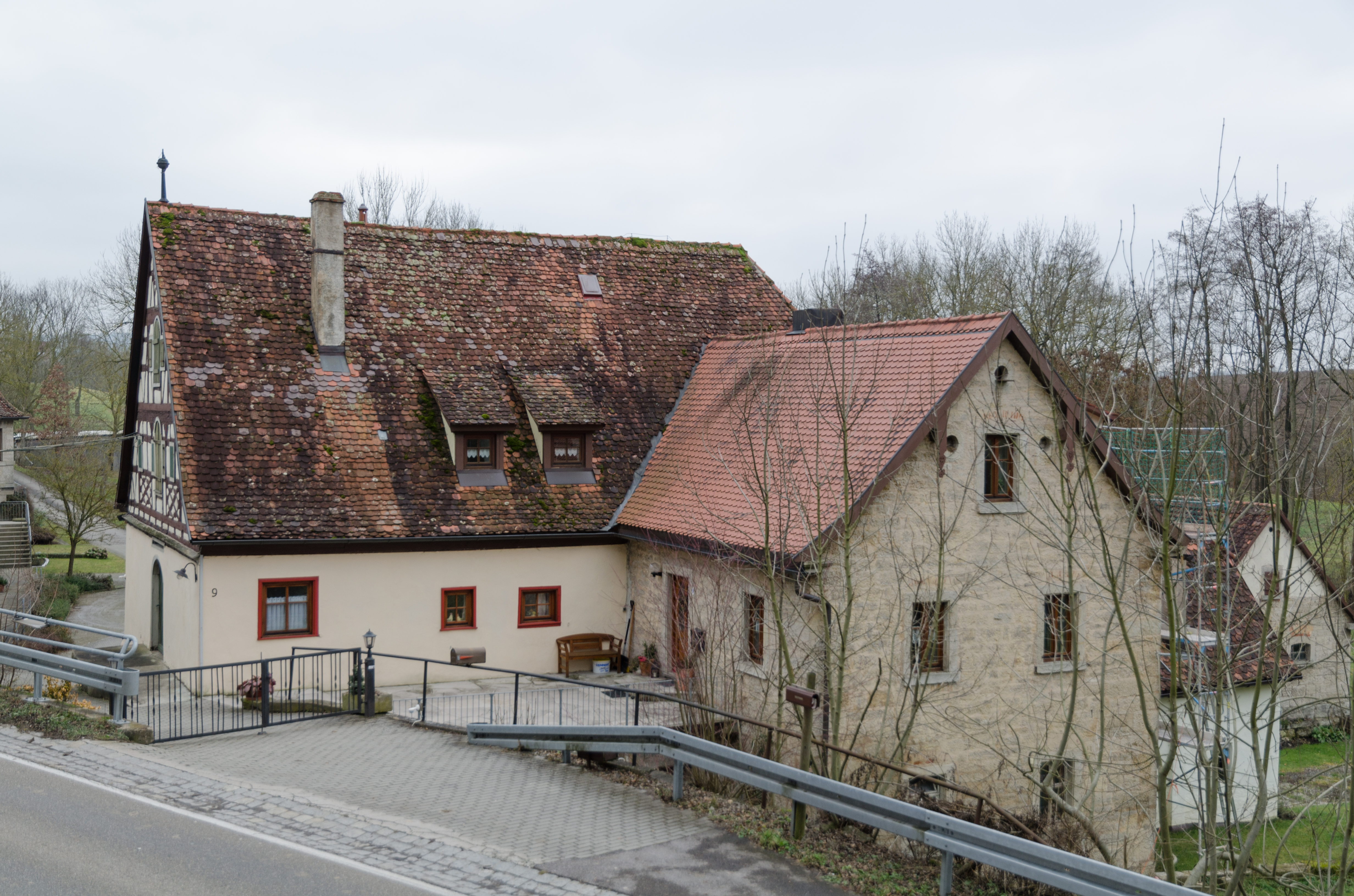 Rothenburg ob der Tauber, Gebsattelerstraße 9, Siechenmühle